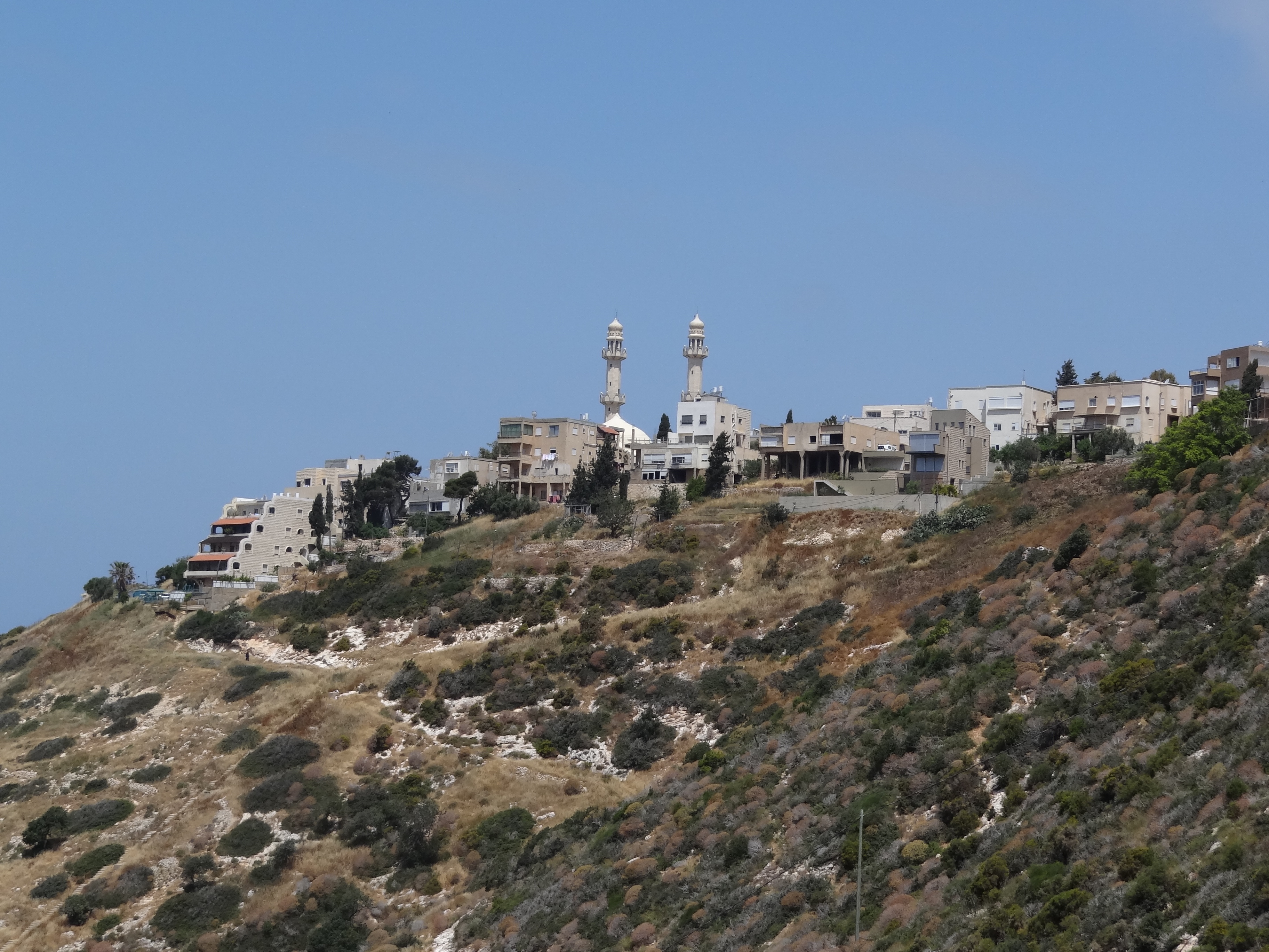 Wadi Siah, Haifa, Israel. נחל שִׂיחַ הוא נחל אכזב בצפון מערב הכרמל. ראשיתו בתוככי העיר חיפה ברחוב לוטוס שבשכונת כרמליה, והוא זורם מערבה לים התיכון. הנחל זורם בין שכונת כבאביר המשמשת כמרכז למוסלמים ה [אחמדים בישראל ובין שכונת כרמליה. בנחל כנסיה כרמליתית מהמאה ה-13, שני מעיינות עין משוטטים ועין שיח, מערת קומתיים ששימשה את הכרמליתים, ובוסתן כיאט מבט על כבביר מהנחל